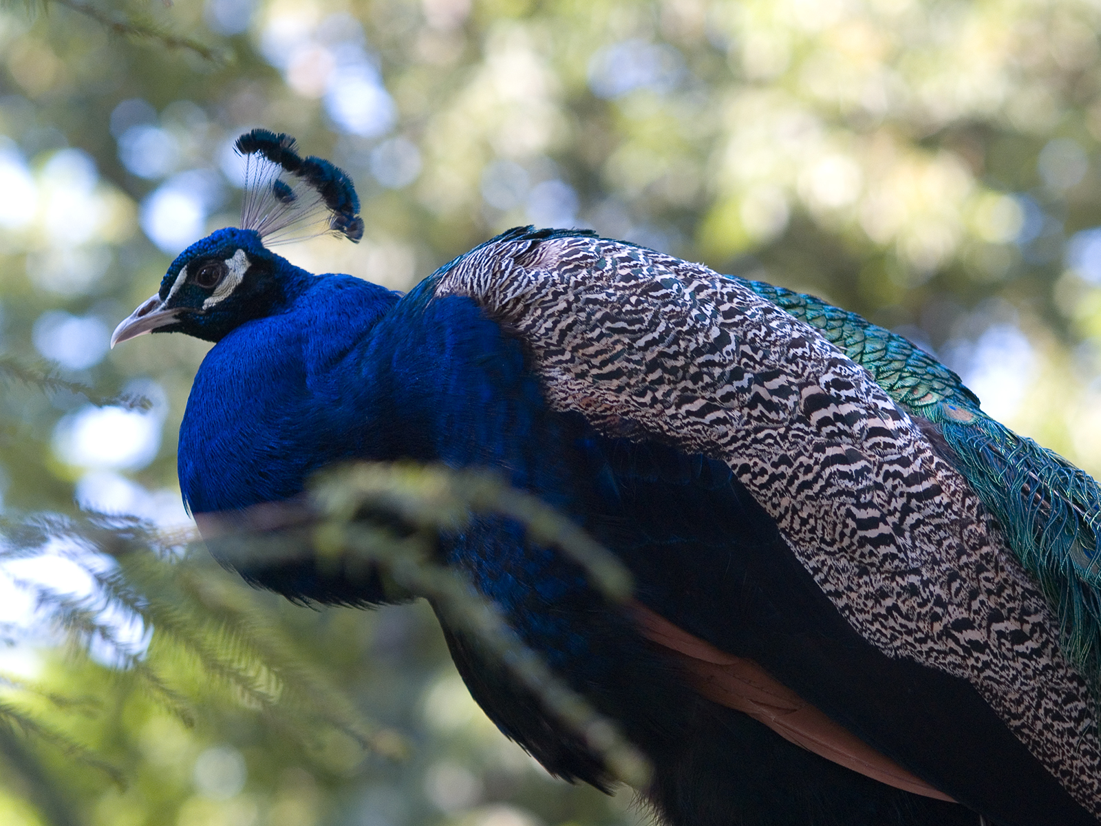 Pavo cristatus